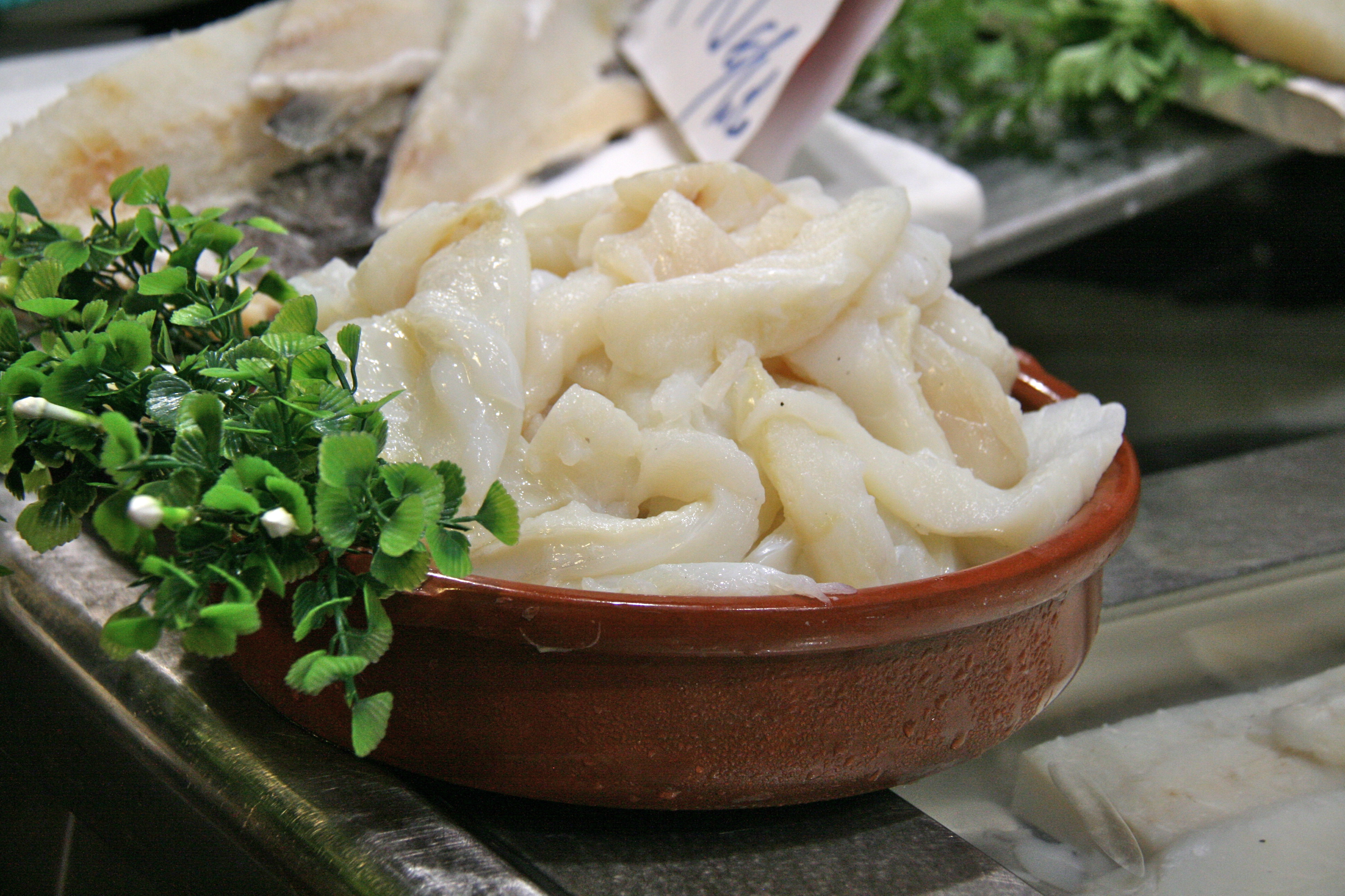 Bacalao en Salazón (desalado) en la Boquería